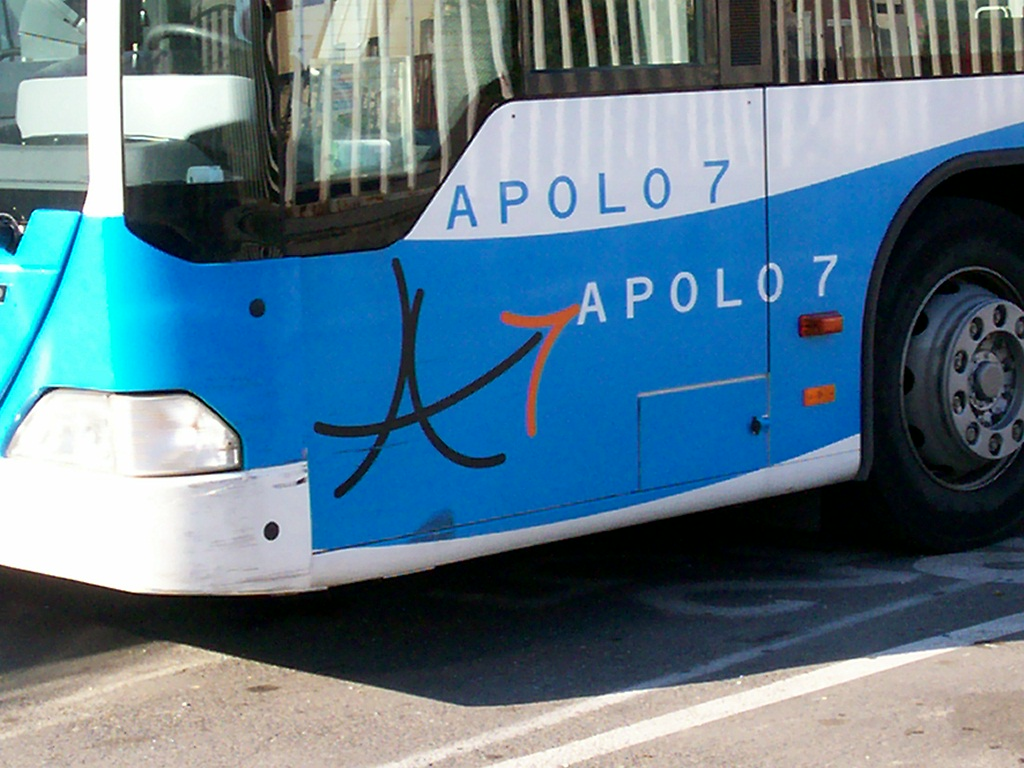 Zoom sur le logo Apolo7 d'un bus Citaro